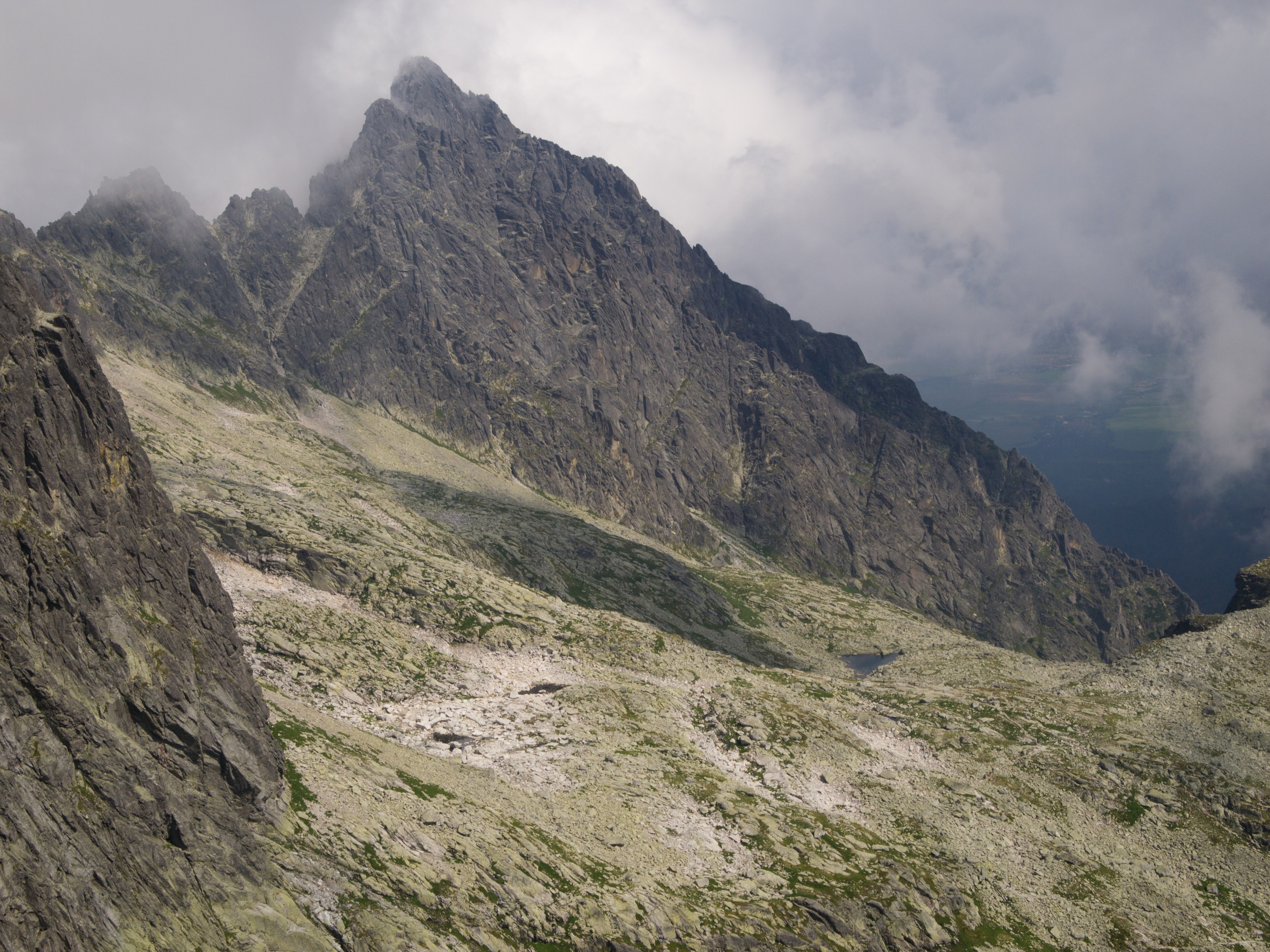 Strzeleckie Pola, Strzeleckie Oka, Strzeleckie Stawy. Od lewej: Sokola Turnia, Drobna Turnia, Żółty Szczyt, Pośrednia Grań.